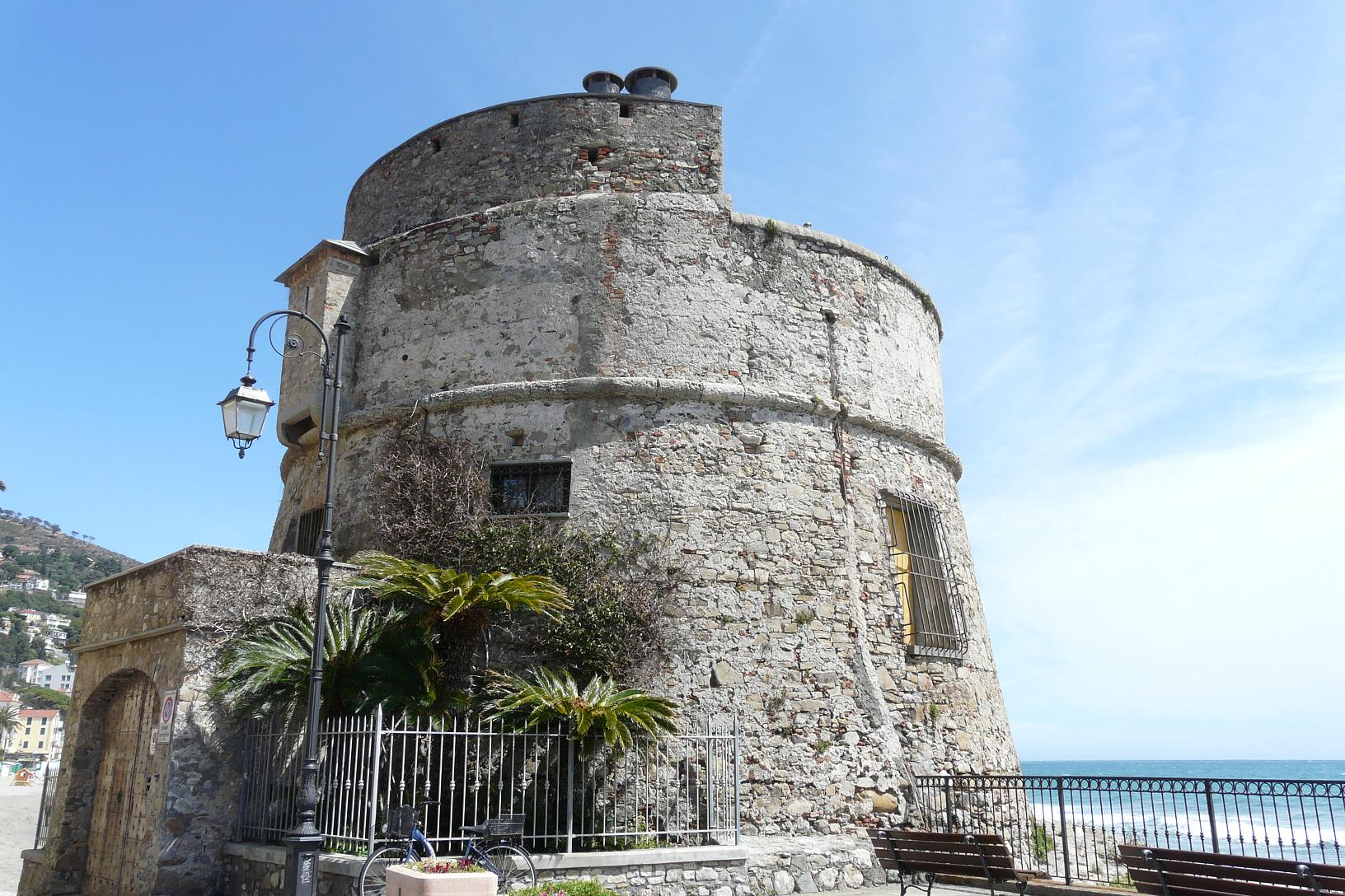 Il Torrione di Alassio, Liguria, Italia